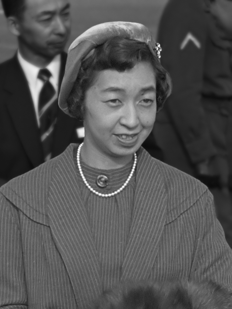 Dochter Keizer van Japan , mevrouw Higa Shikuna op Schiphol 14 oktober 1959